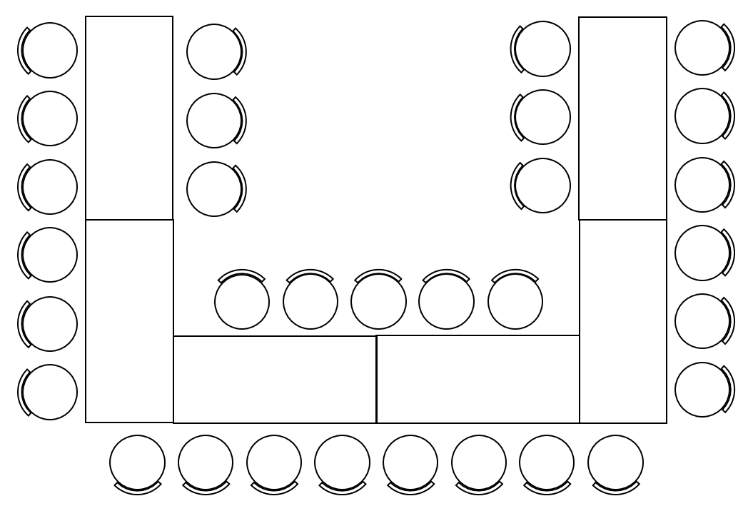 Bordoppsett Dobbel hestesko